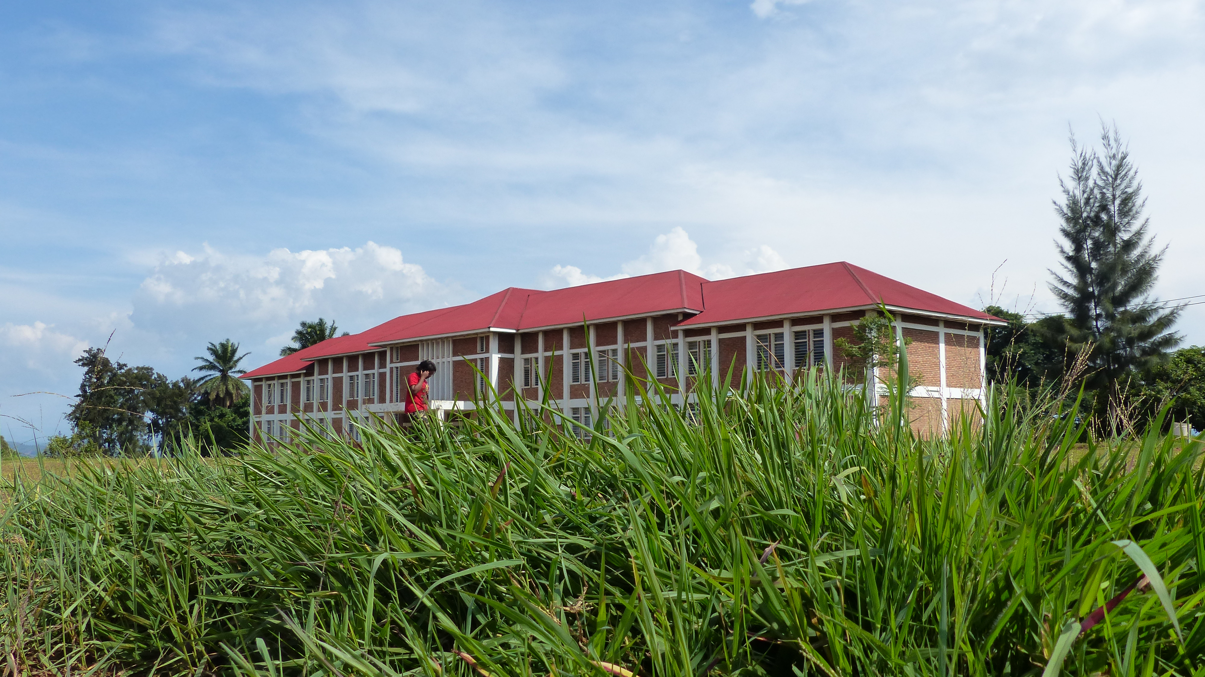 Bâtiment Rukeratabaro au Campus de Kalambo (Crédit Photo Akuzwe Bigosi, Décembre 2018)